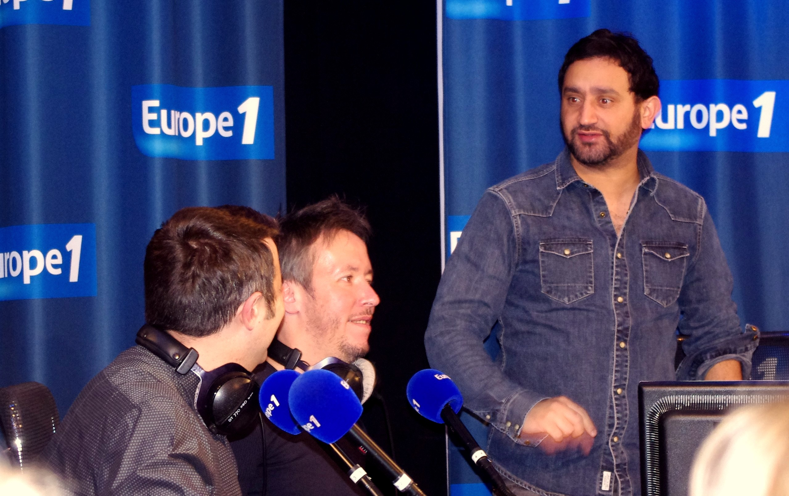 Laurent Guimier, Jean-Luc Lemoine et Cyril Hanouna dans l'émission de radio "Les pieds dans le plat" en 2014.